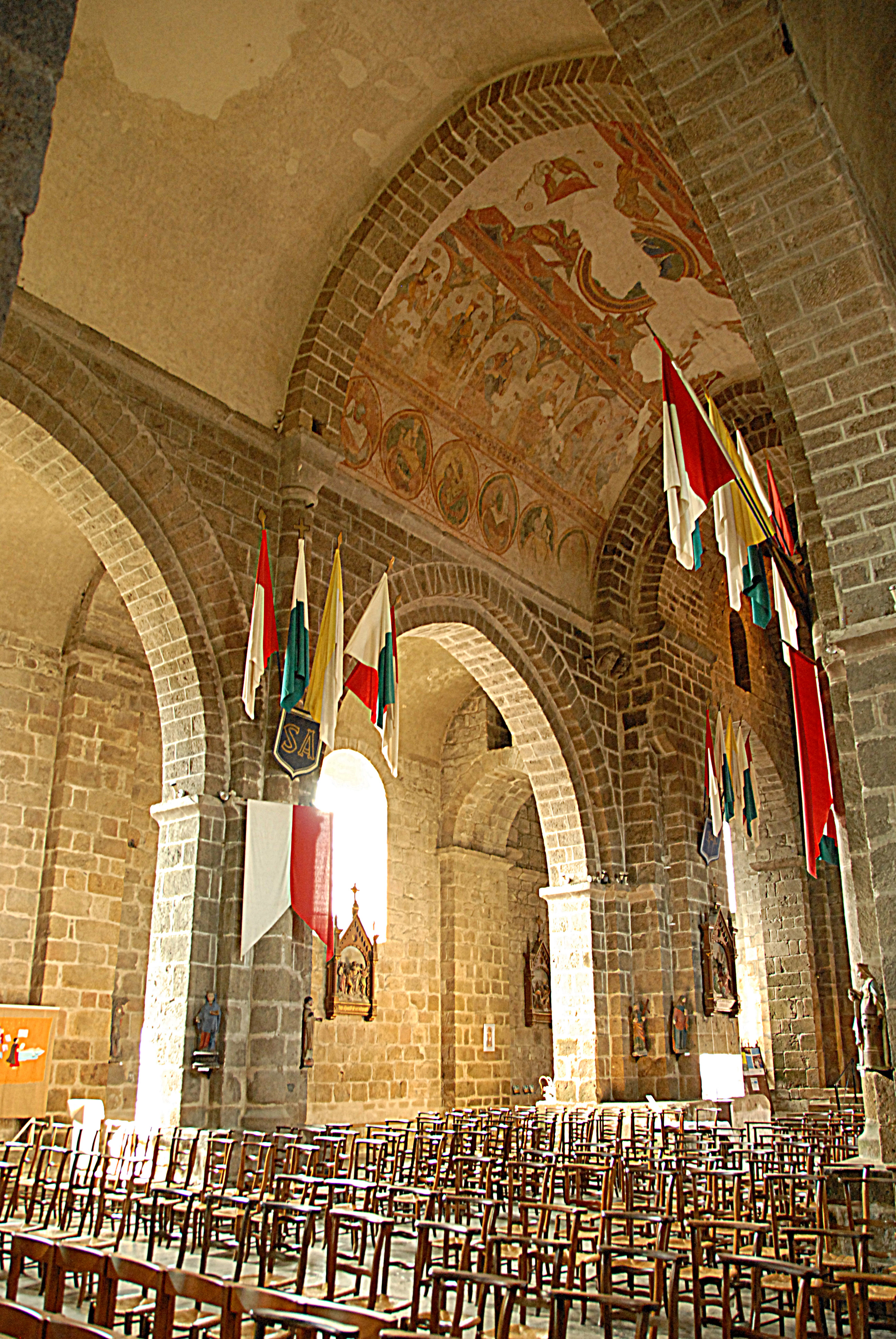 St-Junien, Langhaus, Joche 3 bis 1